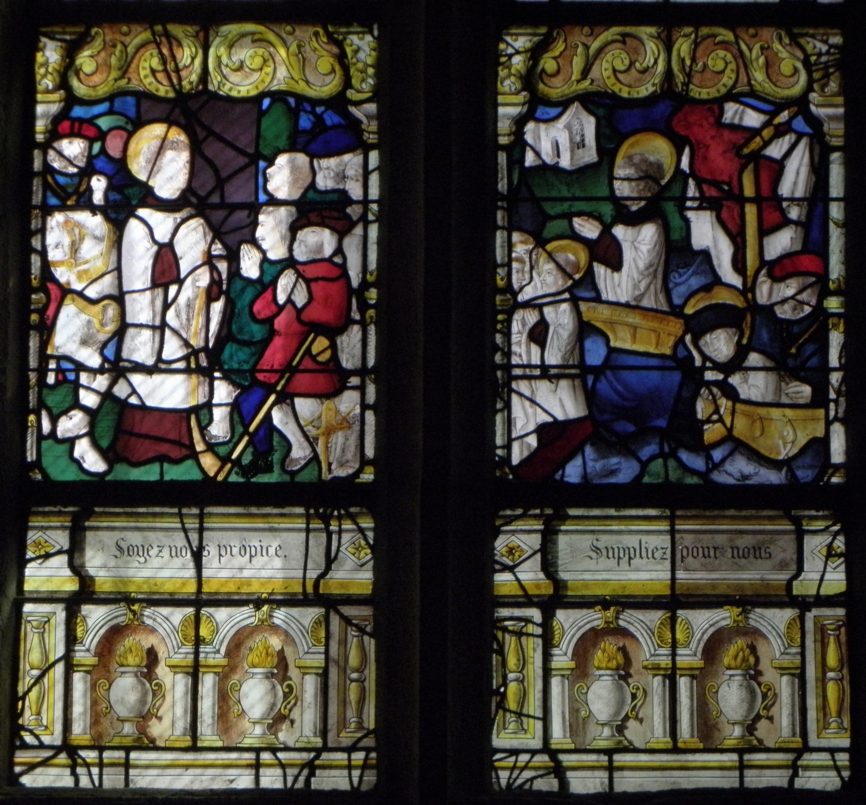 Baie 6 de l'église Saint-Mathurin de Montcontour (22). Vie de Saint-Mathurin. Détail.